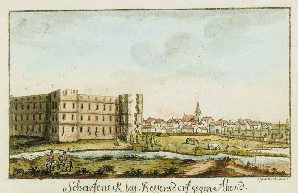 Schlossruine Scharfeneck bei Baiersdorf. Die Schlossruine wurd 1892 abgetragen. Heute erinnert ein Gedenkstein in den Regnitzwiesen an das ehemalige Schloss.